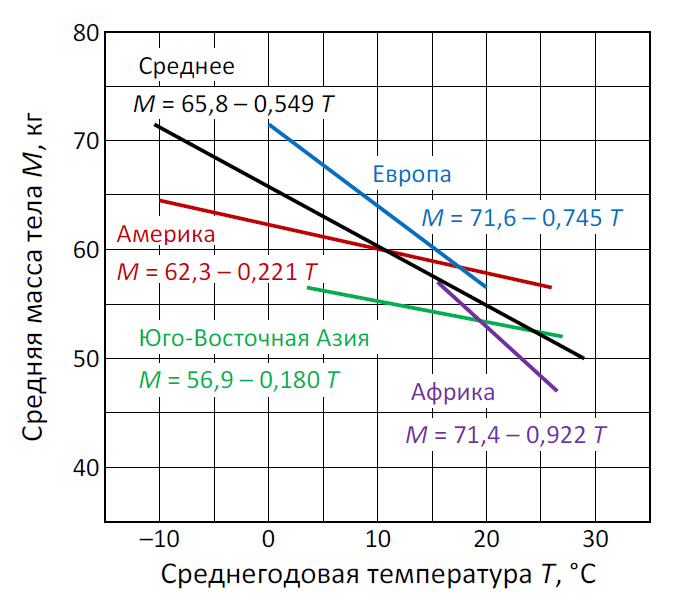 Зависимость средней массы тела различных групп этносов от среднегодовой температуры. По материалам Roberts D. Body weight, race and climate // Amer. J. Phys. Anthropol. 1953. Vol. 11. P. 533–558. Градусы Фаренгейта пересчитаны в градусы Цельсия.